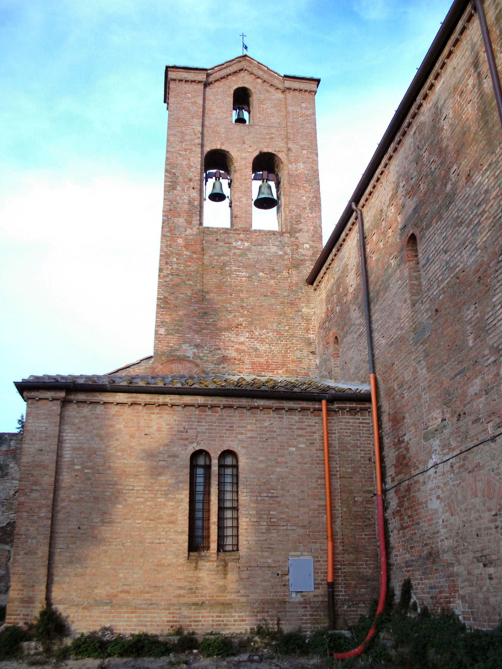 Pieve di Castelfiorentino